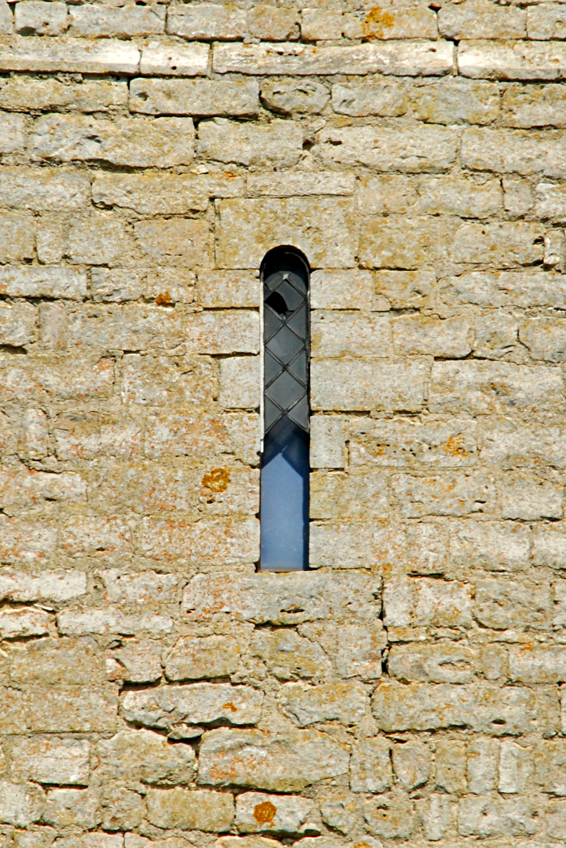 Belgique - Brabant wallon - Jodoigne - Église Saint-Pierre de Sainte-Marie-Geest